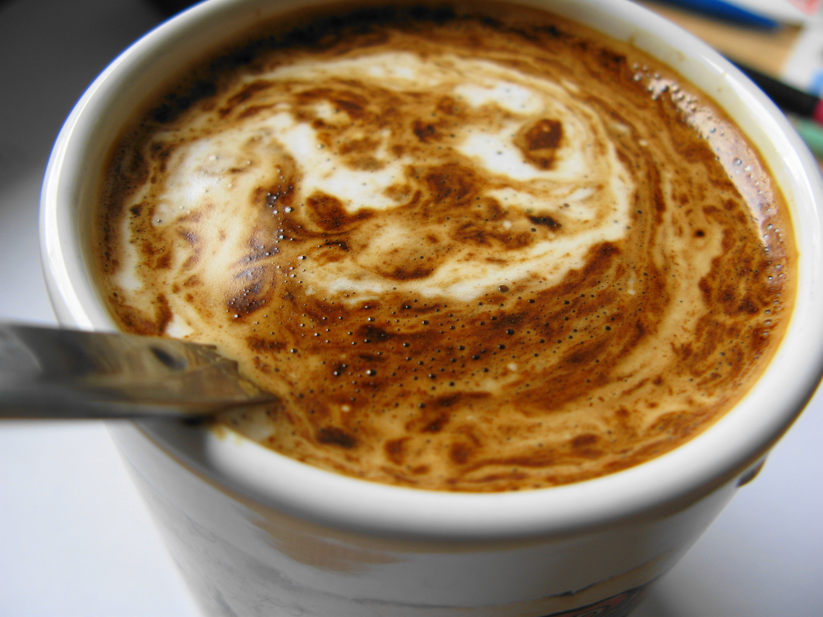 Šolja "Jakobs kronat gold" instant kafe.